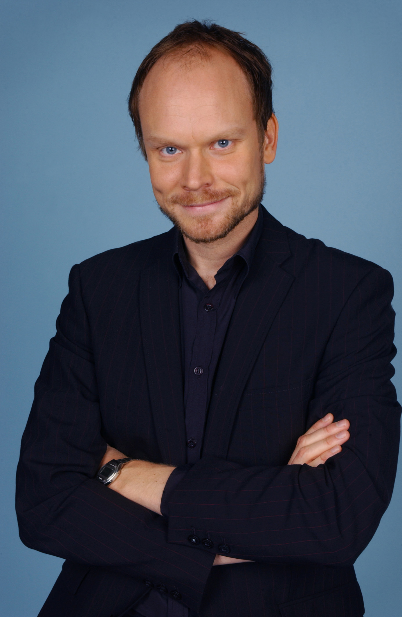 Programledaren Kristian Luuk.